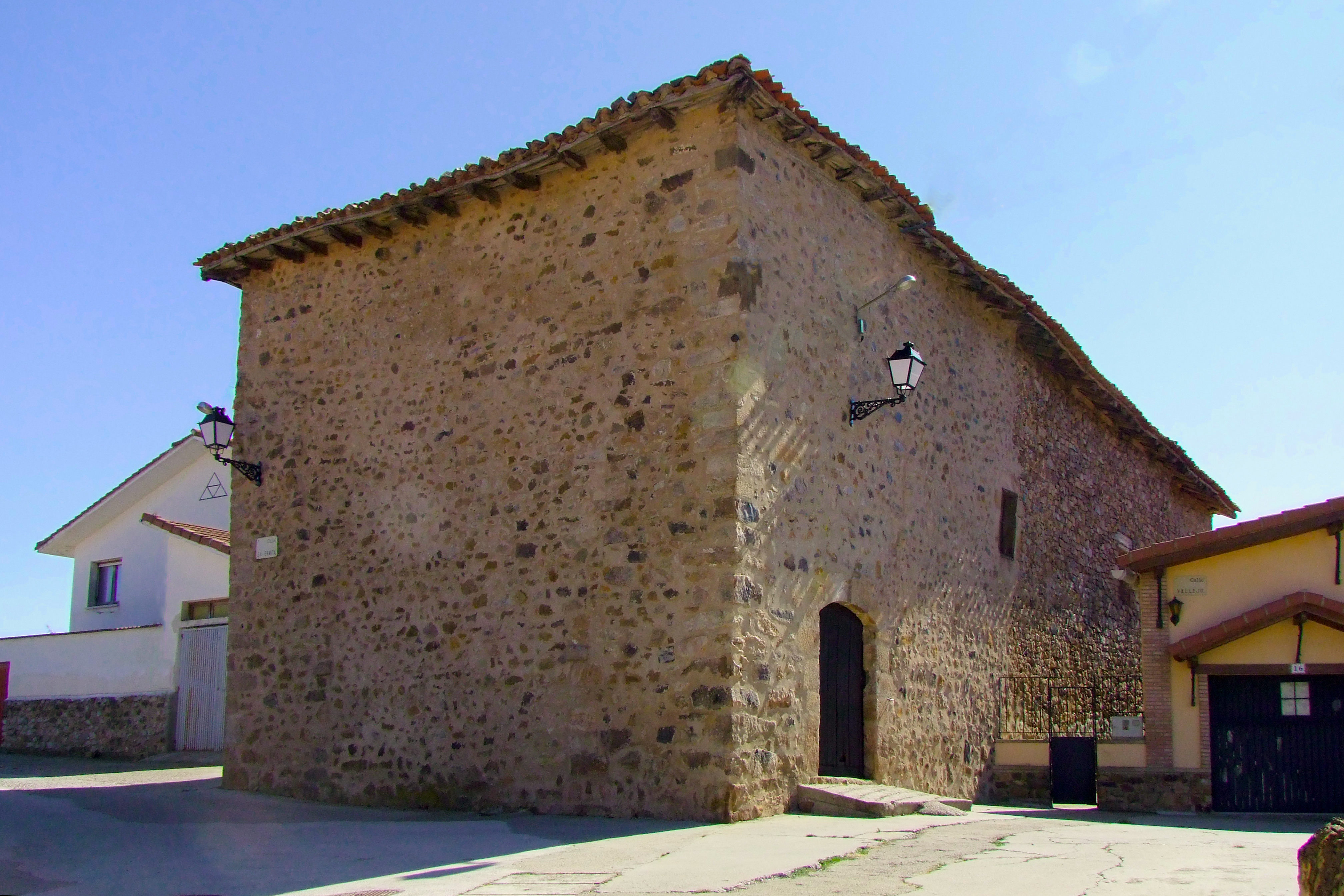 Ermita del Santo Cristo en la localidad de Lumbreras, La Rioja - España